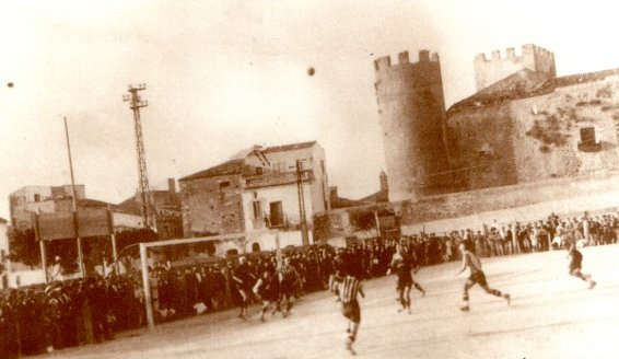 A.S.D. Alcamo